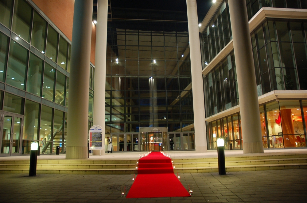 Az SZTE Kongresszusi Központ épülete éjjel